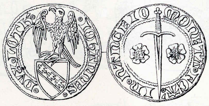 Lorraine, Denier de Jean Ier, DS VI-14